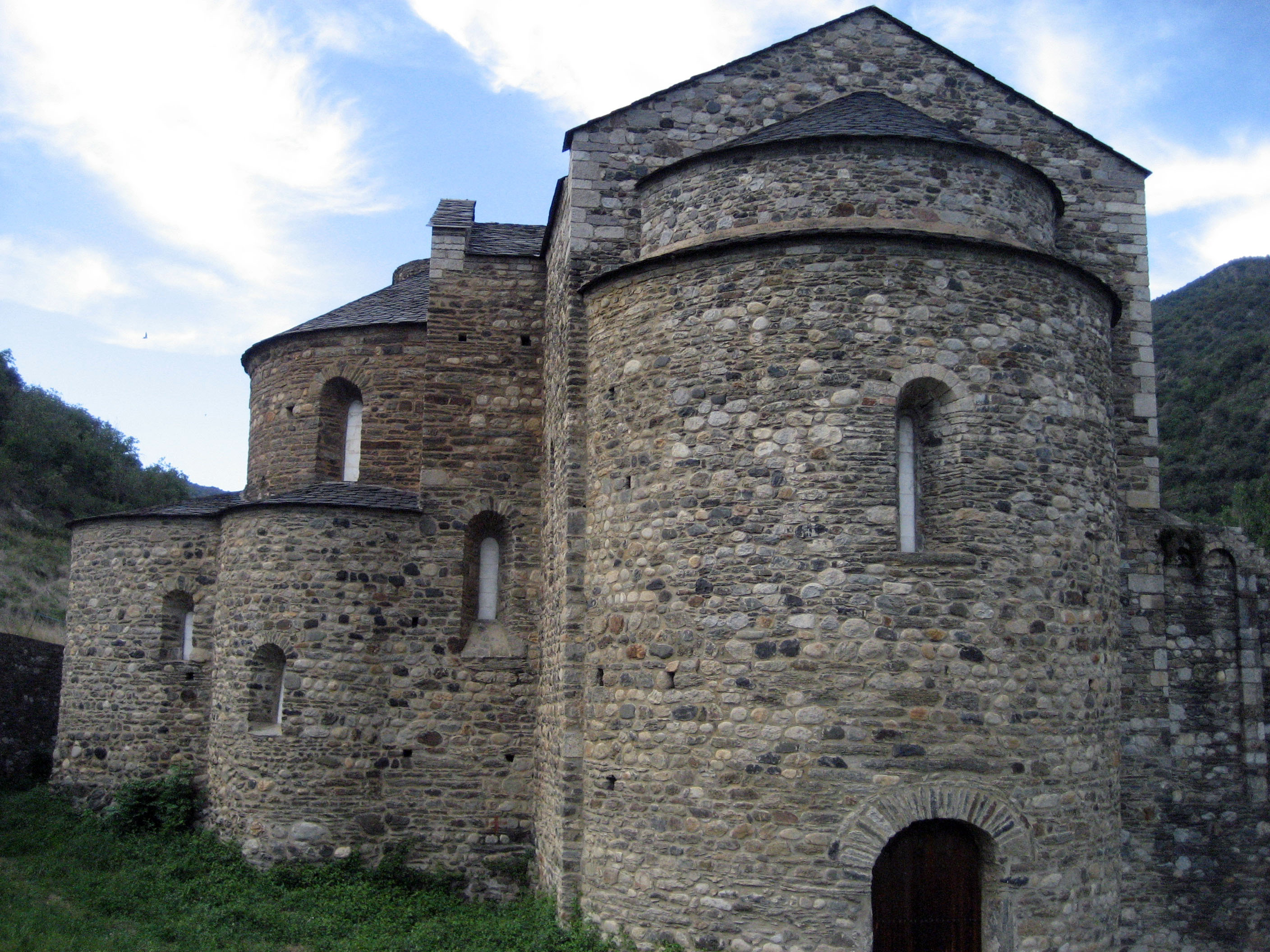 Ábside lateral del monasterio de Sant Sadurní de Tavèrnoles en Anserall de la comarca del Alto Urgel en Cataluña (España)